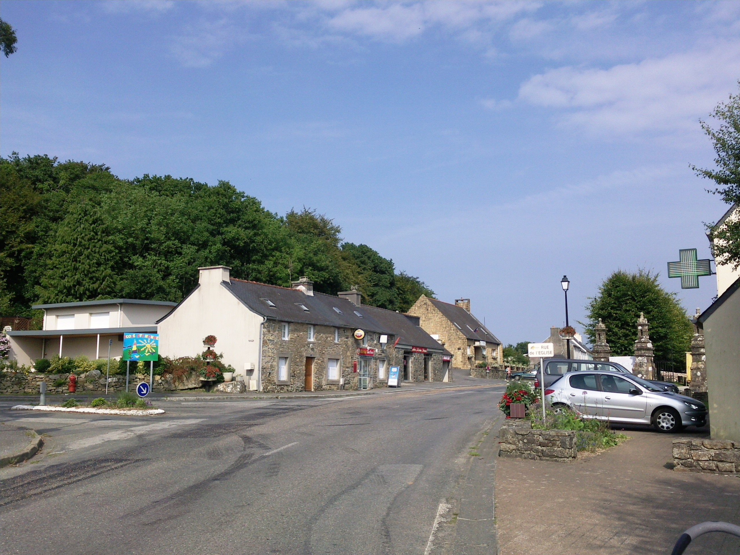 Bourg de Dirinon